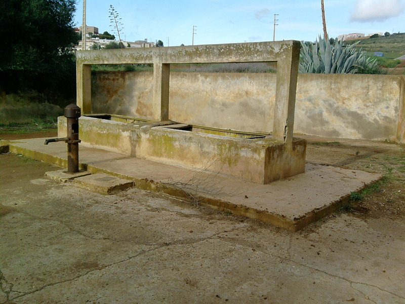 قرى المغرب